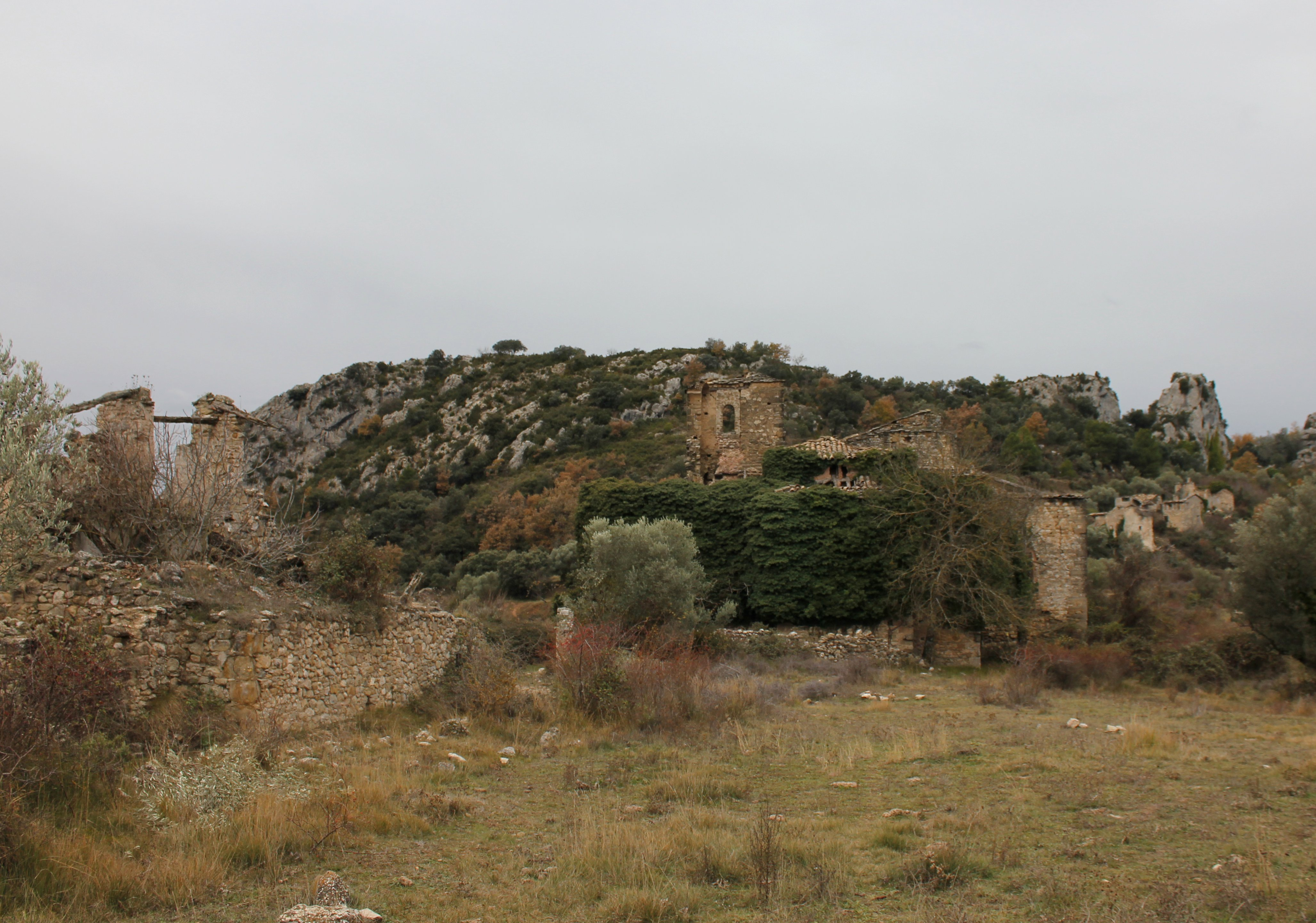 Aragonés: Plano de A Penilla (A Fueva, Sobrarbe).